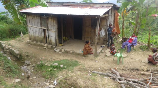 Hütte in Lauana, Atsabe, Ermera, Osttimor